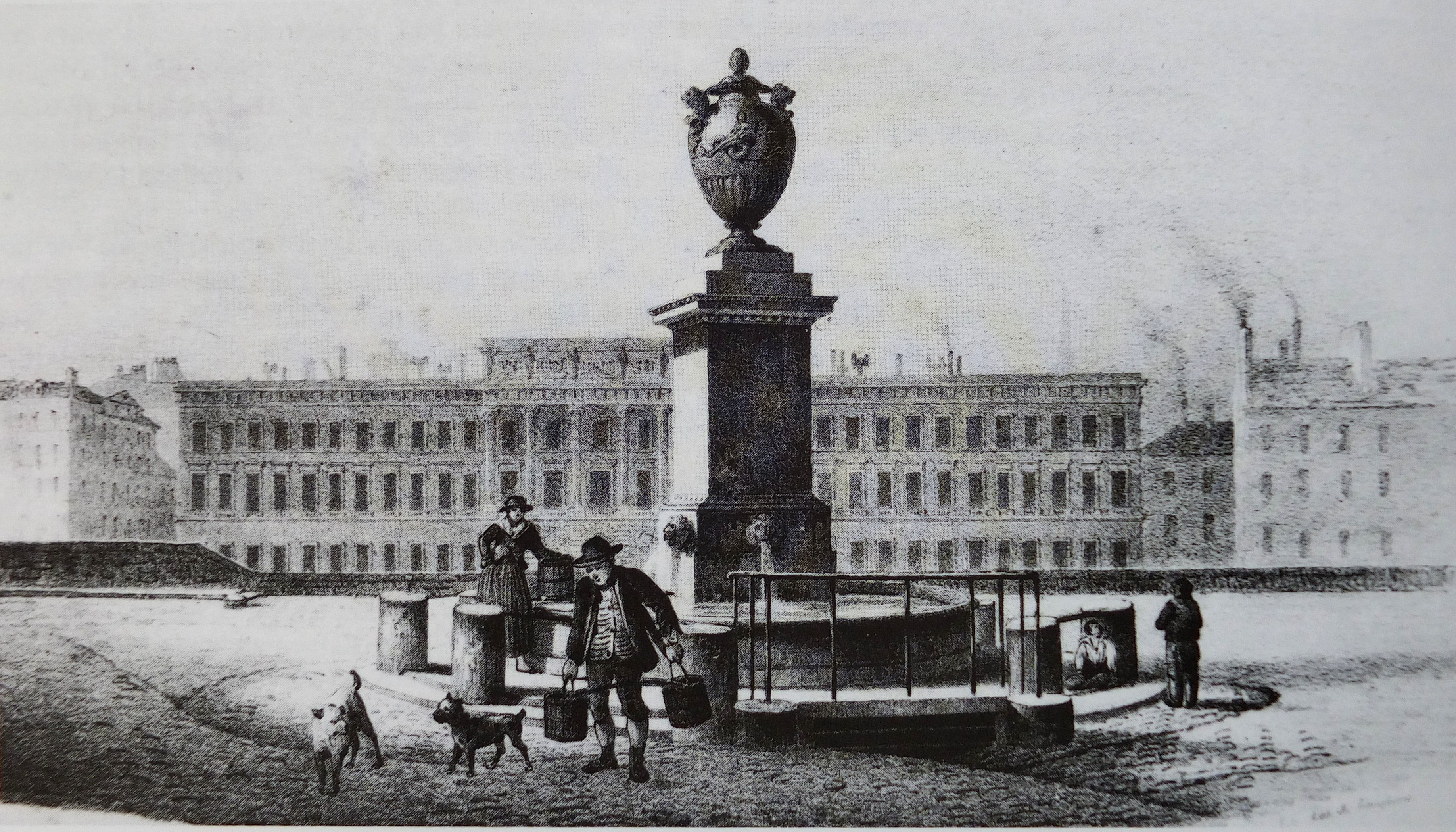 Gravure représentant la Fontaine de la place de l'école (Paris Ier arrond.). Détruite en 1854. Lithographie de Joseph Langlumé d'après un dessin d'Arnout 1828. En face, l'Hôtel des Monnaies sur la rive gauche.